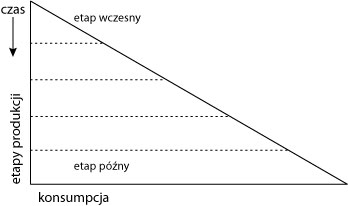 Etapy produkcji od wczesnego po późny